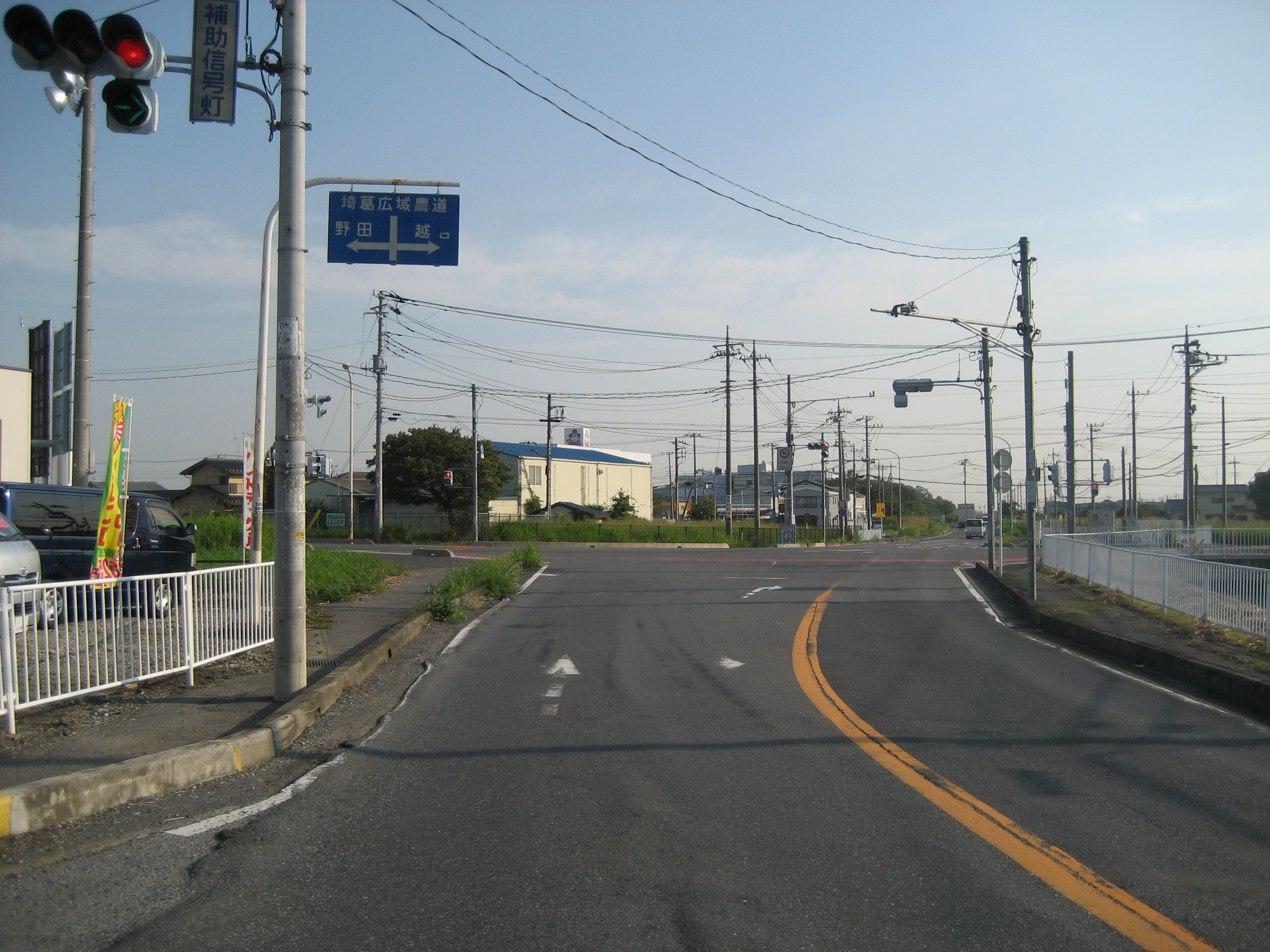 埼葛広域農道埼玉県北葛飾郡松伏町東埼玉テクノポリス入口交差点付近（農道終点）を撮影